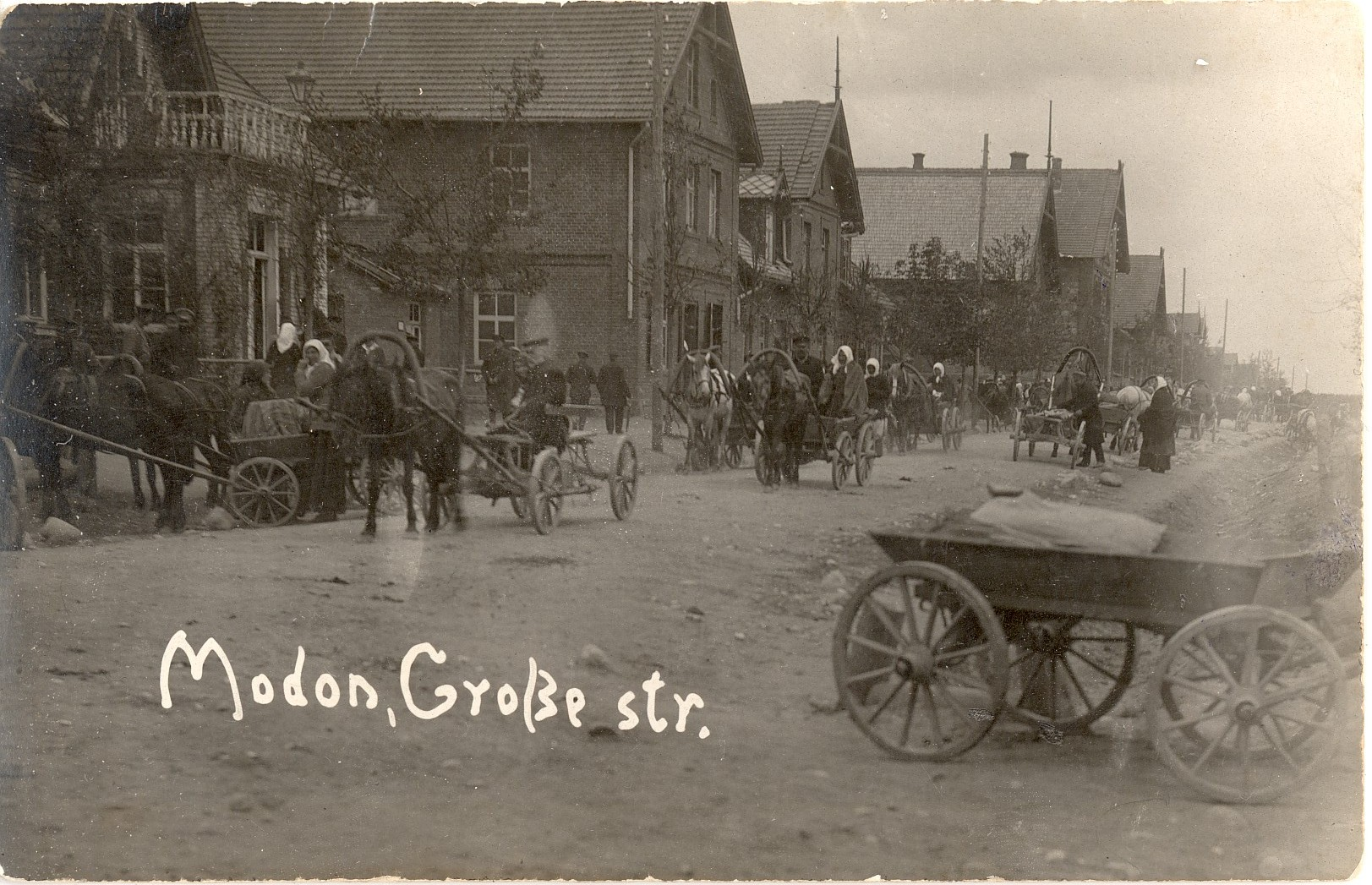 Modon, Große straße.jpg